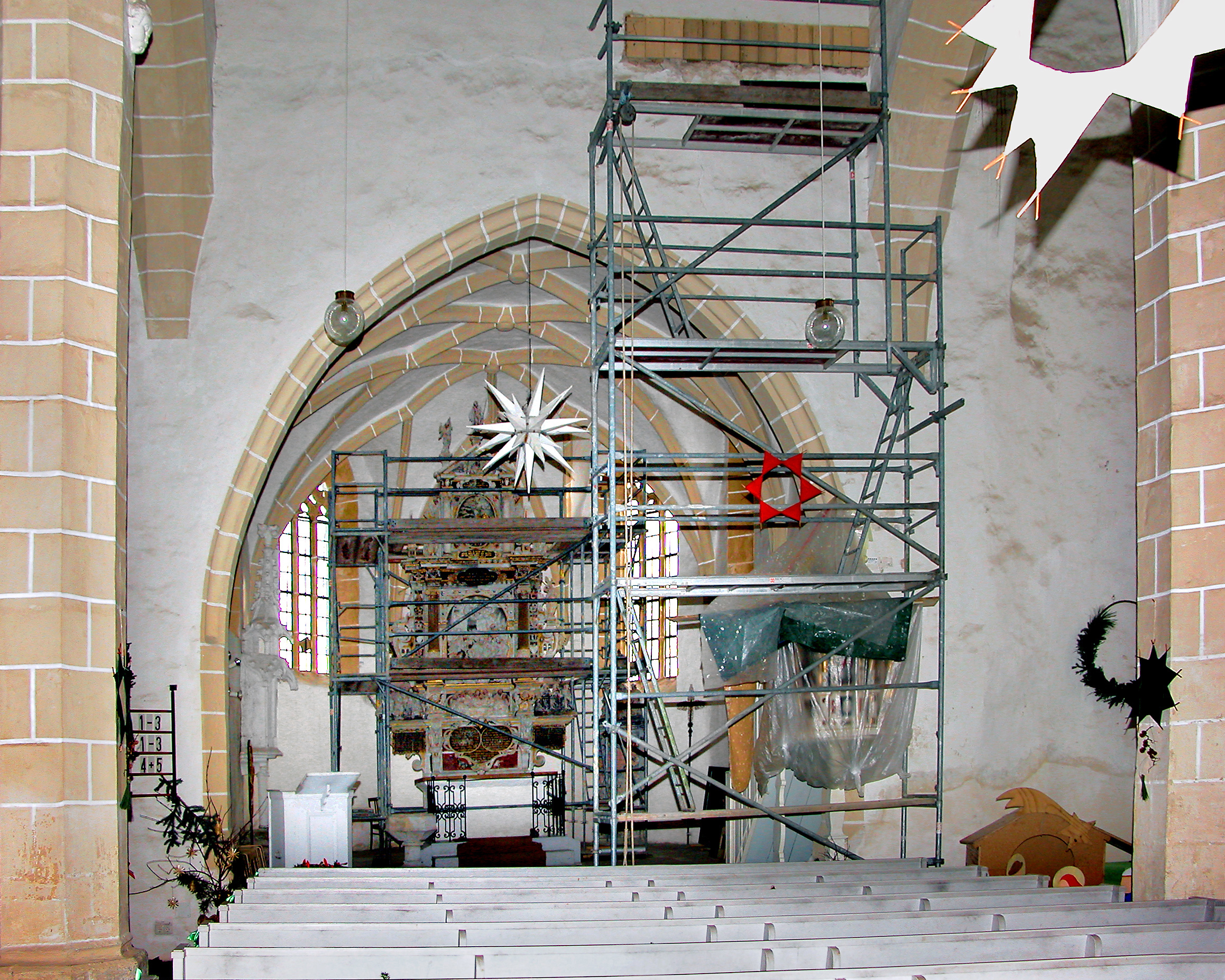 05.12.2009 01665 Burkhardswalde (Klipphausen) Kirchweg: Ehemalige Wallfahrtskirche (GMP: 51.073714,13.430011), Dorfkirche. Dreischiffige spätgotische Hallenkirche (15. Jahrhundert) in Sanierung.. [DSCN40325.TIF]20091205055DR.JPG(c)Blobelt